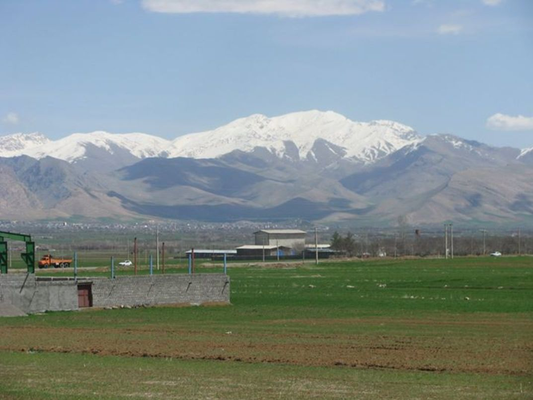 قله ولاش الشتر عکاس دیگو